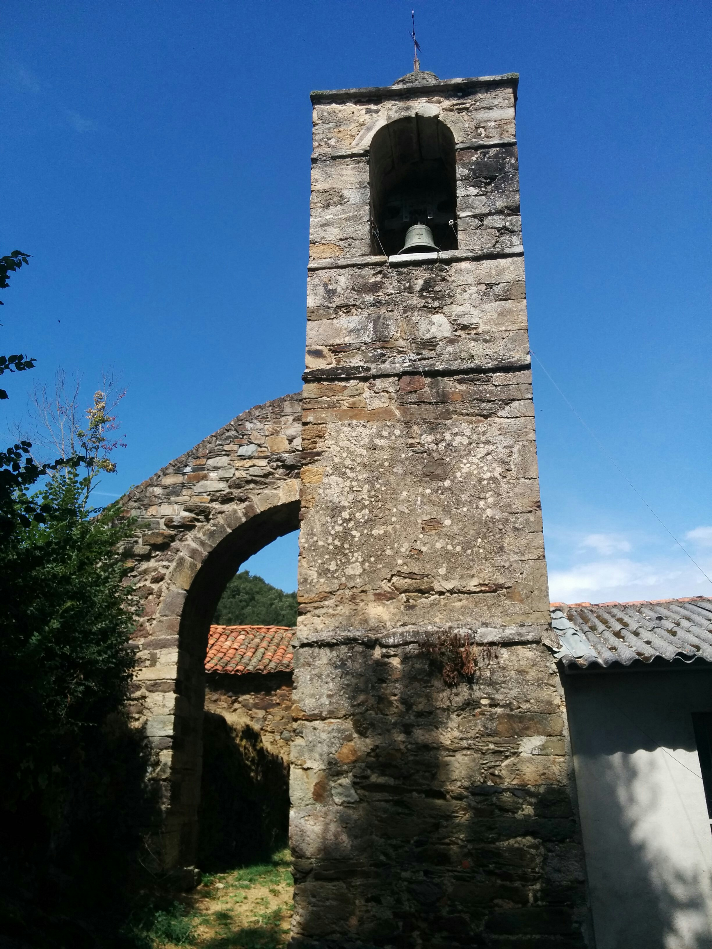 Torre del campanario de Callejo de Ordás, León, España